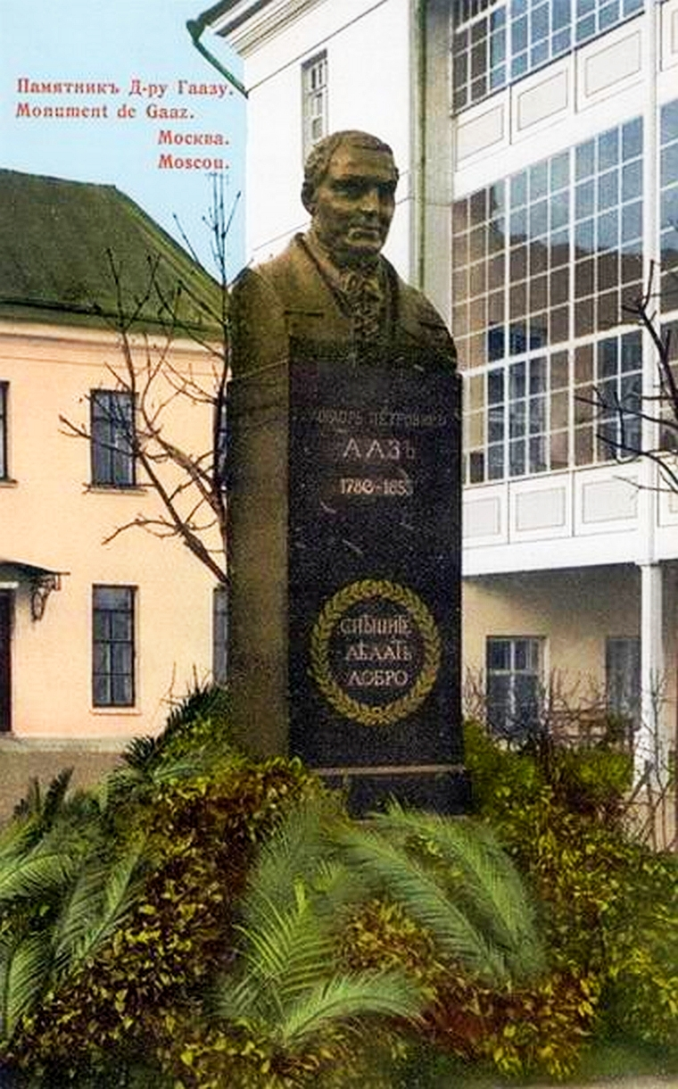 Памятник доктору Гаазу в Москве в Малом Казённом переулке.